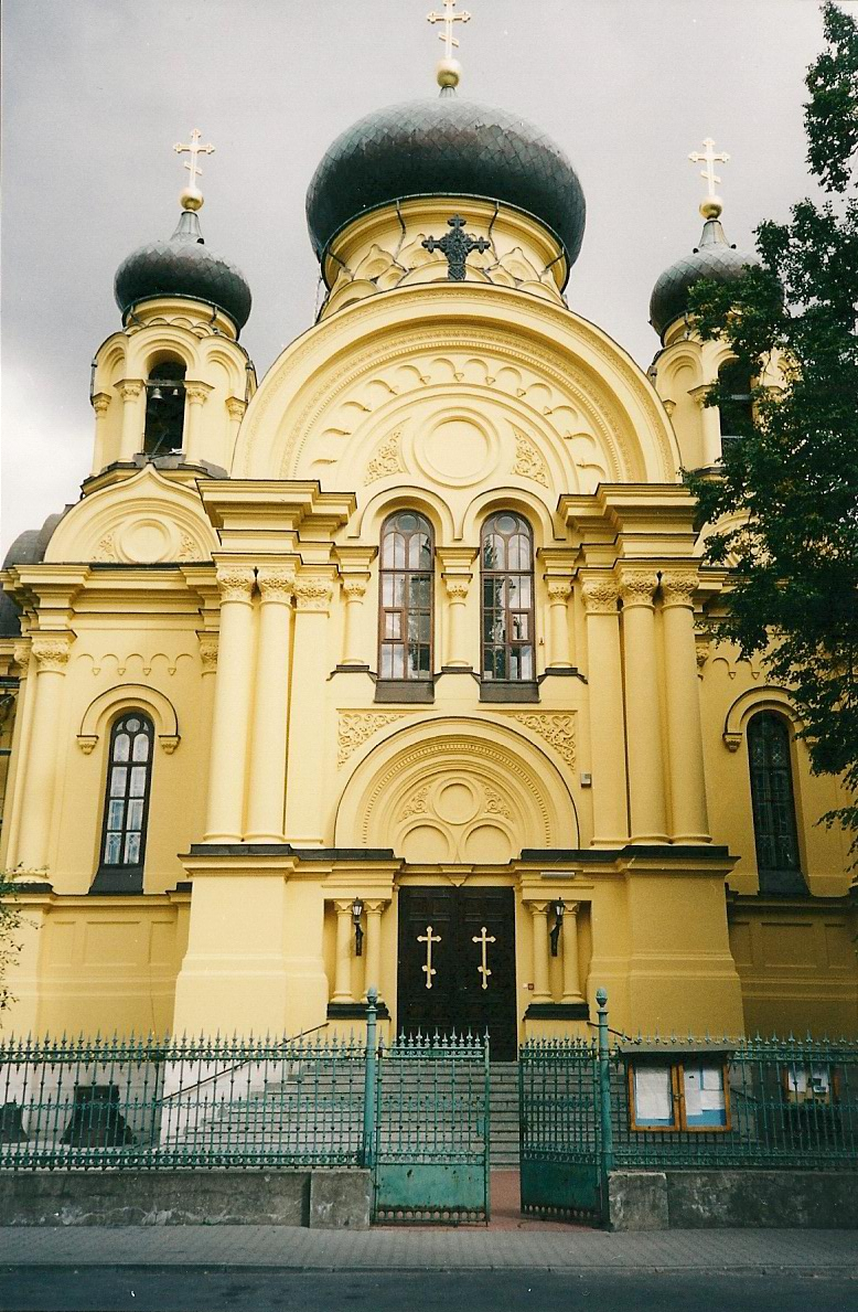 православна црква у Варшави